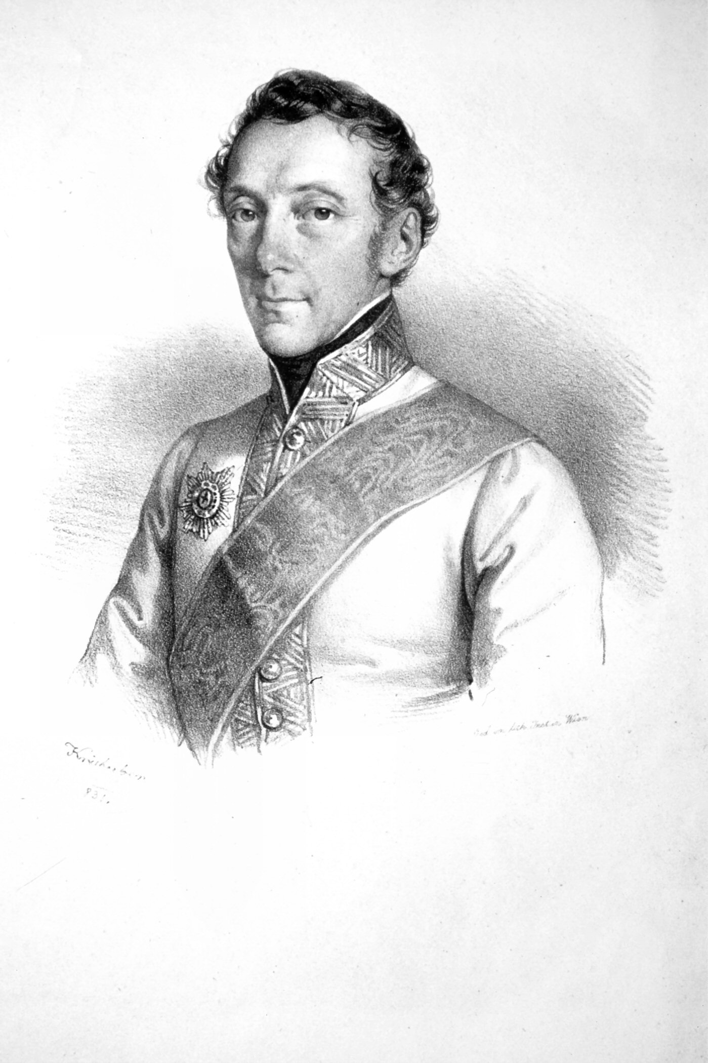 Vinzenz Graf Desfours-Walderode (1778-1857), österreichischer General Lithographie von Josef Kriehuber, 1831